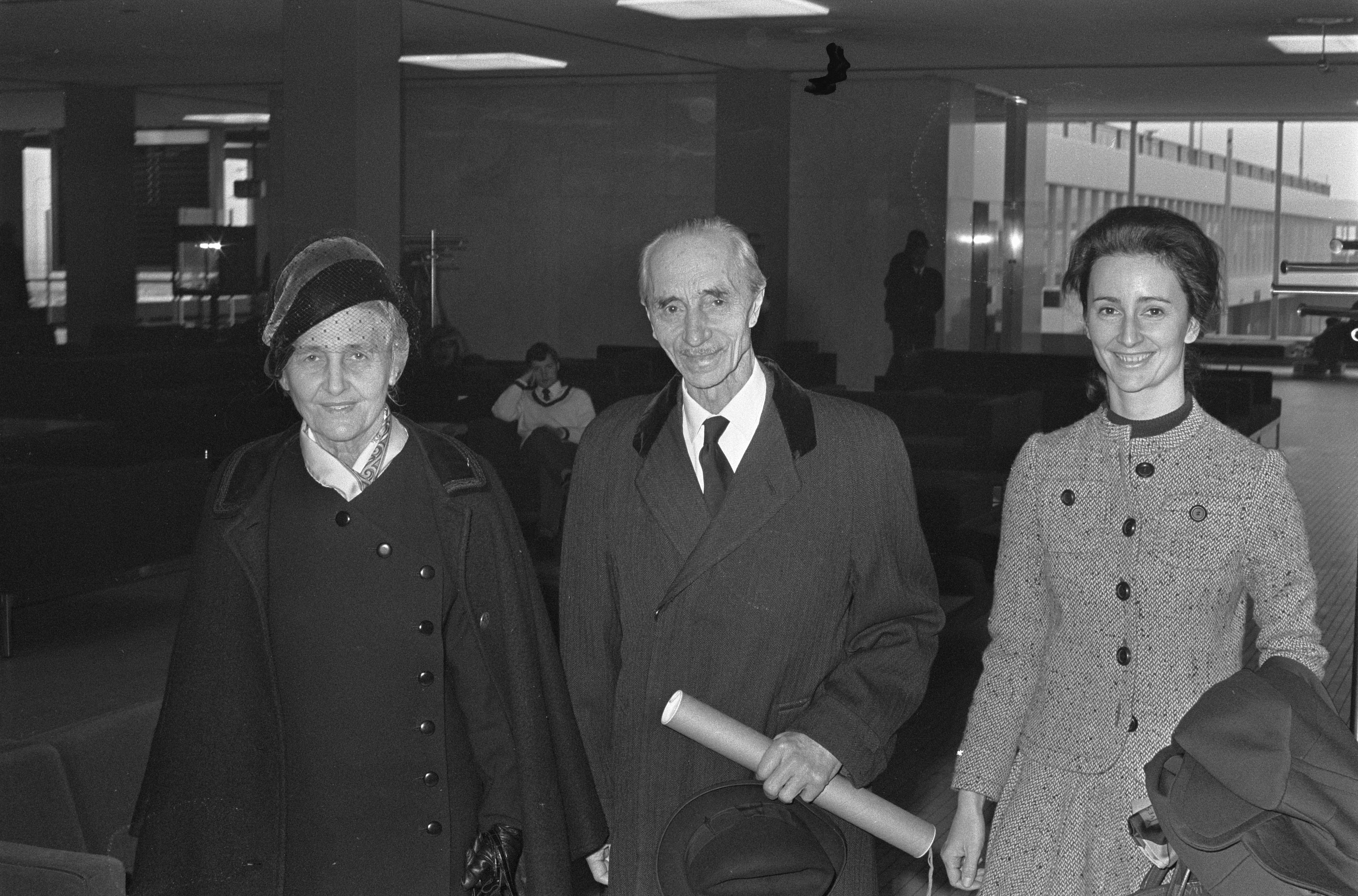 Collectie / Archief : Fotocollectie Anefo Reportage / Serie : [ onbekend ] Beschrijving : Ouders en zusters van prins Carlos Hugo vertrekken van Schiphol. Prinses Madeleine van Bourbon Parma , prins Xavier en prinses Marie des Neiges Datum : 30 januari 1970 Trefwoorden : OUDERS, VLIEGVELDEN, prinsen Persoonsnaam : Carlos Hugo, prins, Prinses Madeleine van Bourbon Parma Fotograaf : Evers, Joost / Anefo Auteursrechthebbende : Nationaal Archief Materiaalsoort : Negatief (zwart/wit) Nummer archiefinventaris : bekijk toegang 2.24.01.05 Bestanddeelnummer : 923-2030